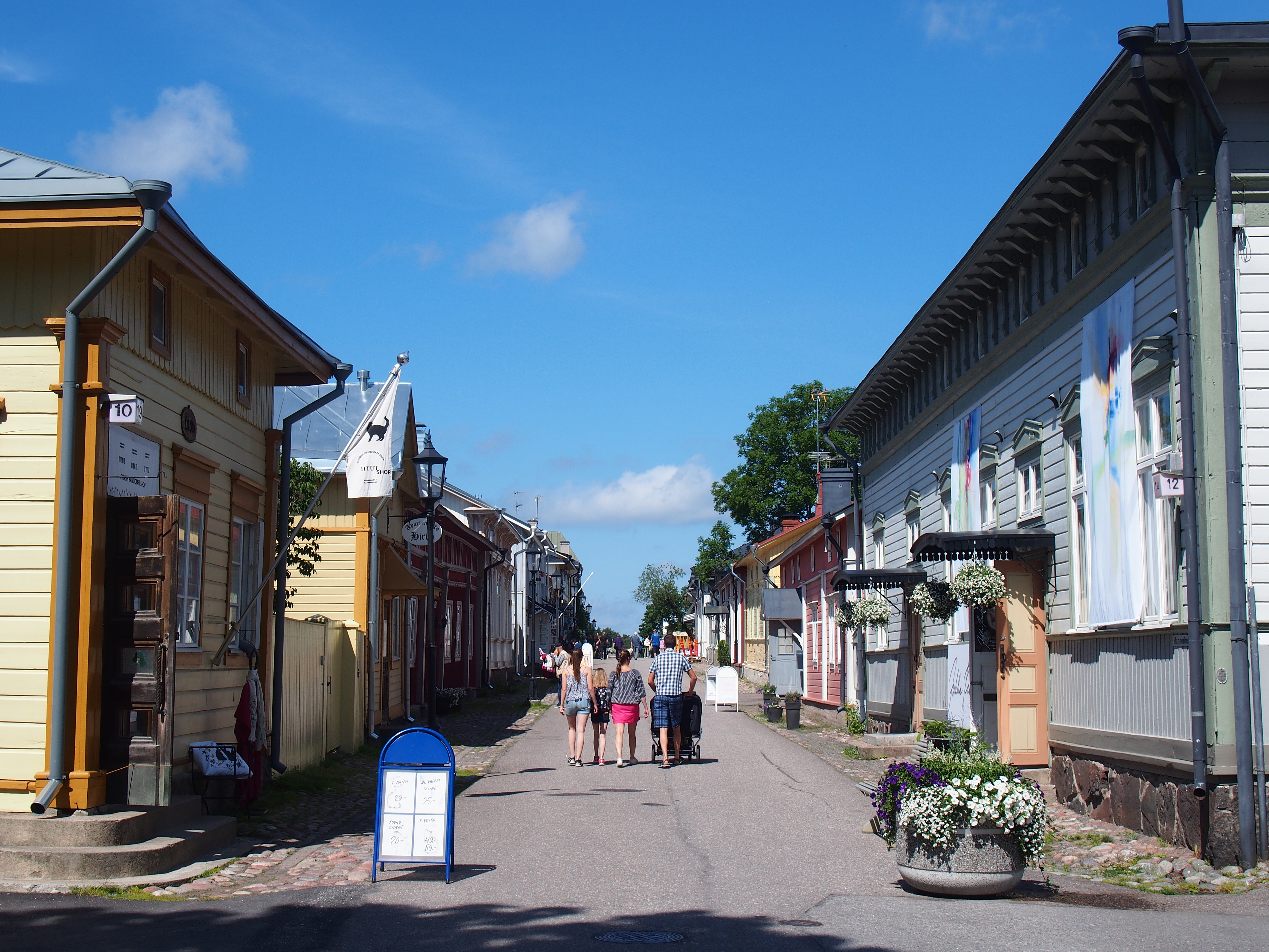 Naantalin kantakaupunki 12. heinäkuuta 2017 26